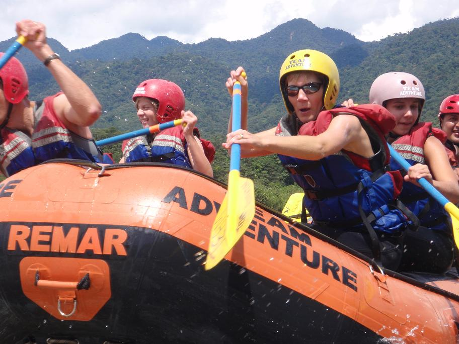 Rafting en el Rio Pastaza en Baños de Agua Santa